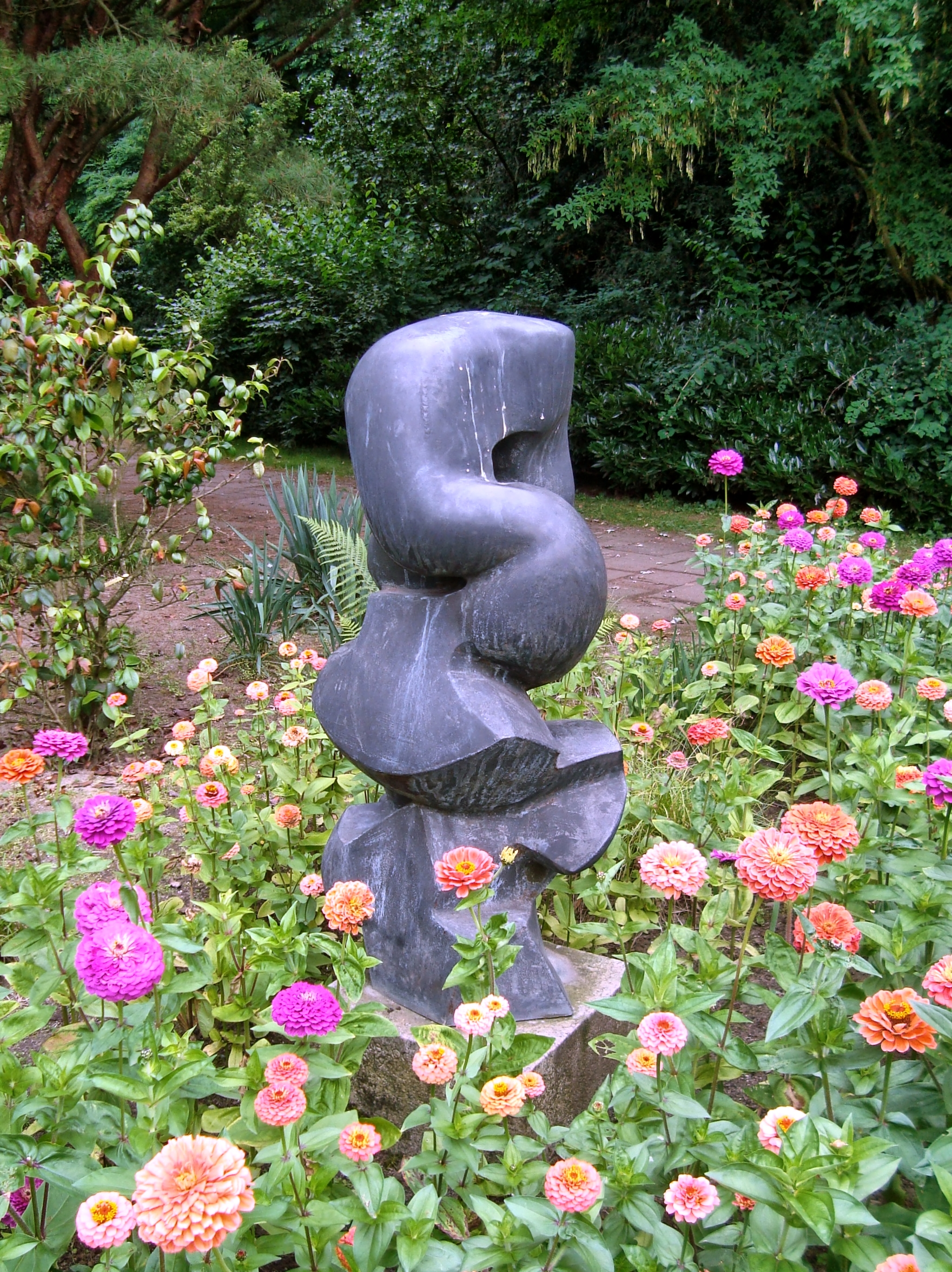 Andre Bloc, o.T., 1961, Düsseldorf, Nordpark